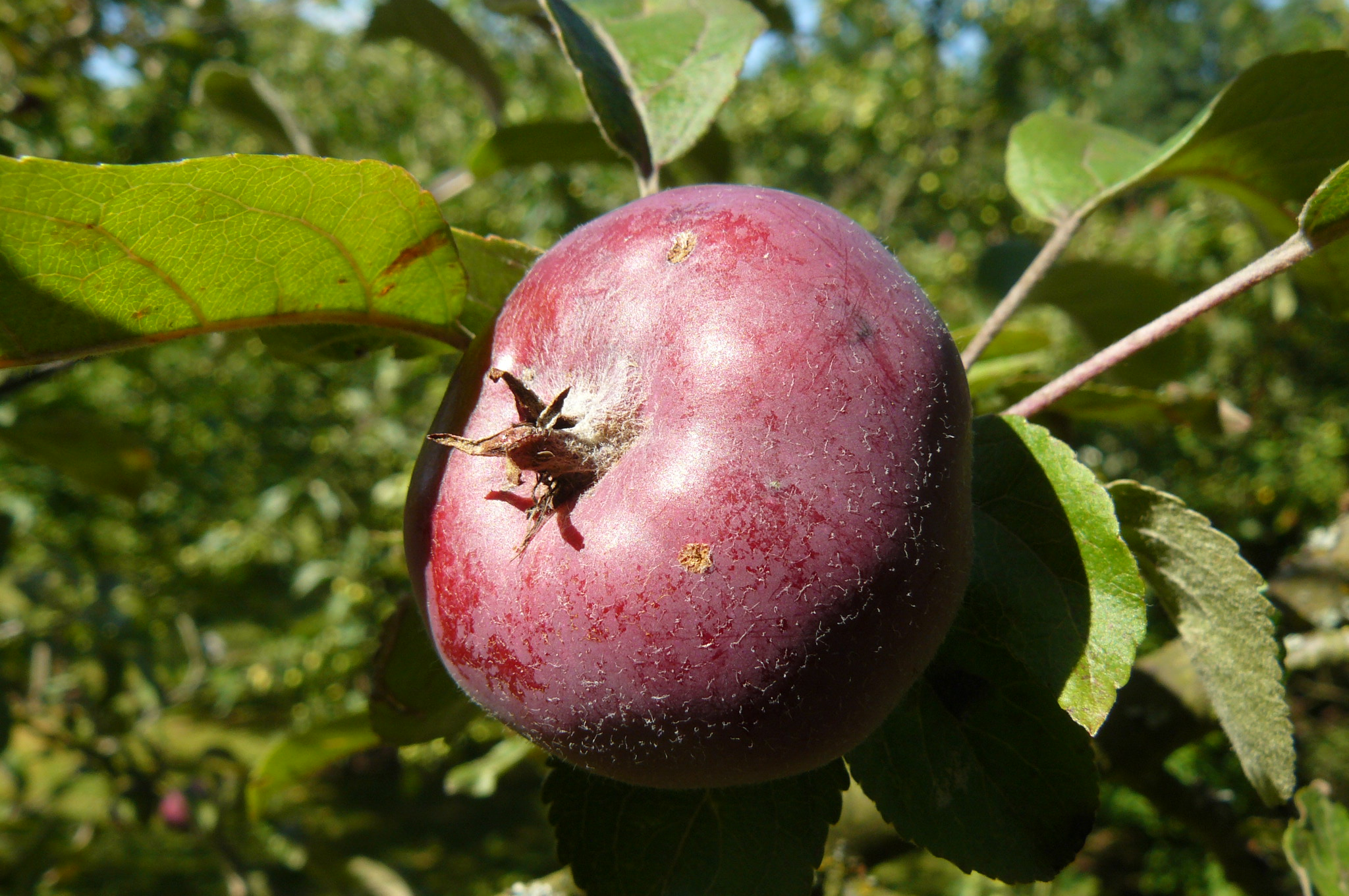 Odmiana jabłoni w Arboretum Wirty.